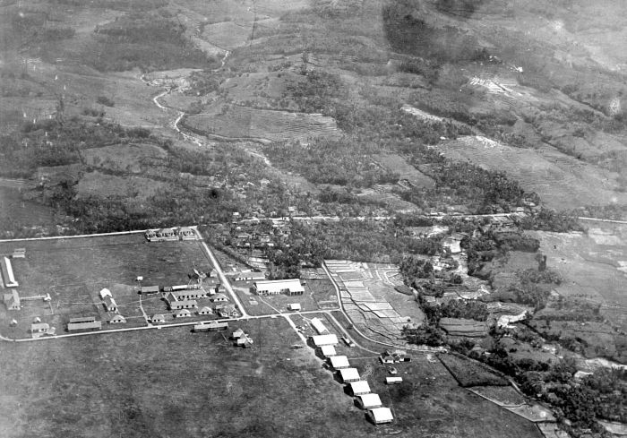 Repronegatief. Luchtfoto van vliegkamp Soeka-Miskin in West-Java van 1000 meter hoogte genomen